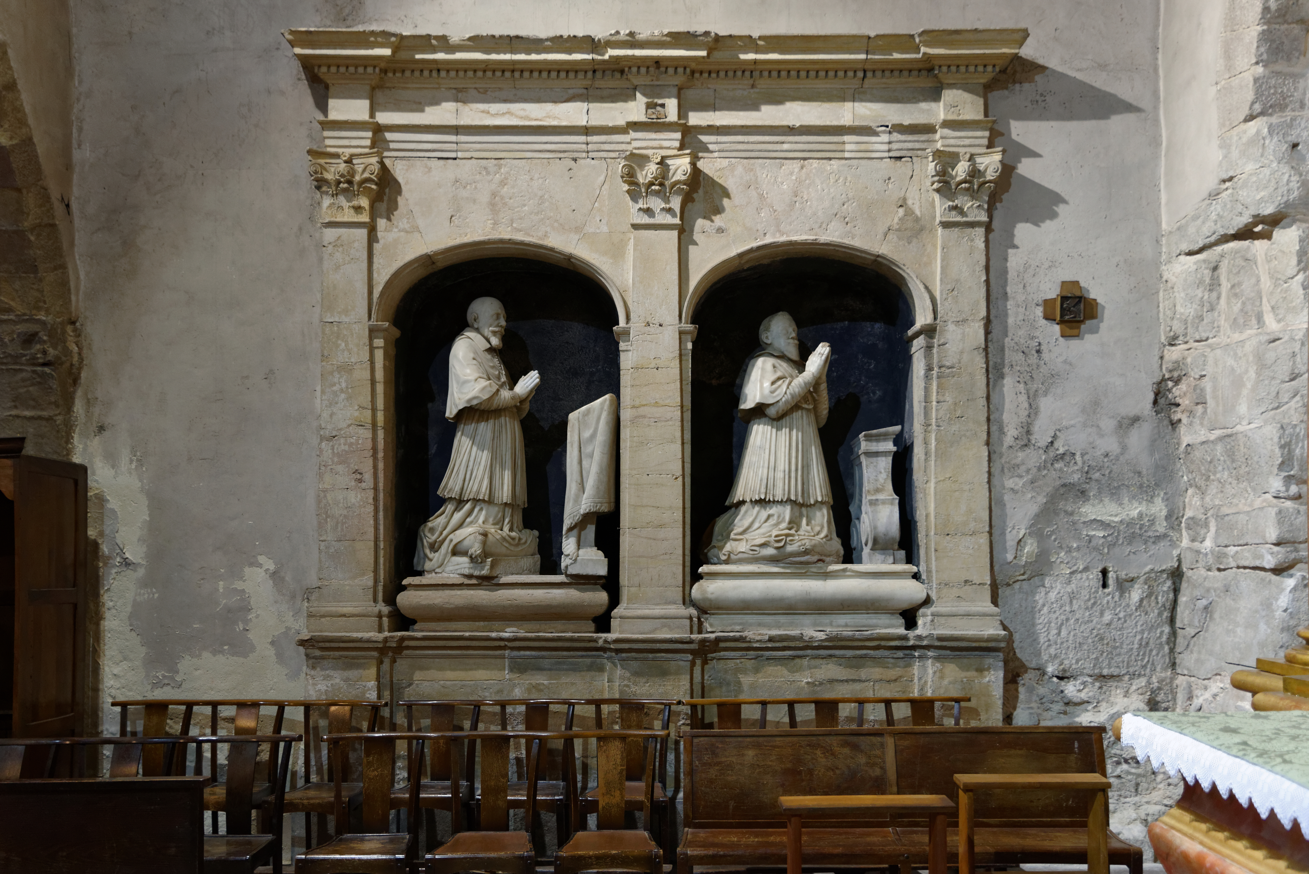 Tombeaux des évêques Barthélémy et Pierre de Camelin. Cathédrale Saint Léonce (Fréjus, Var, France)